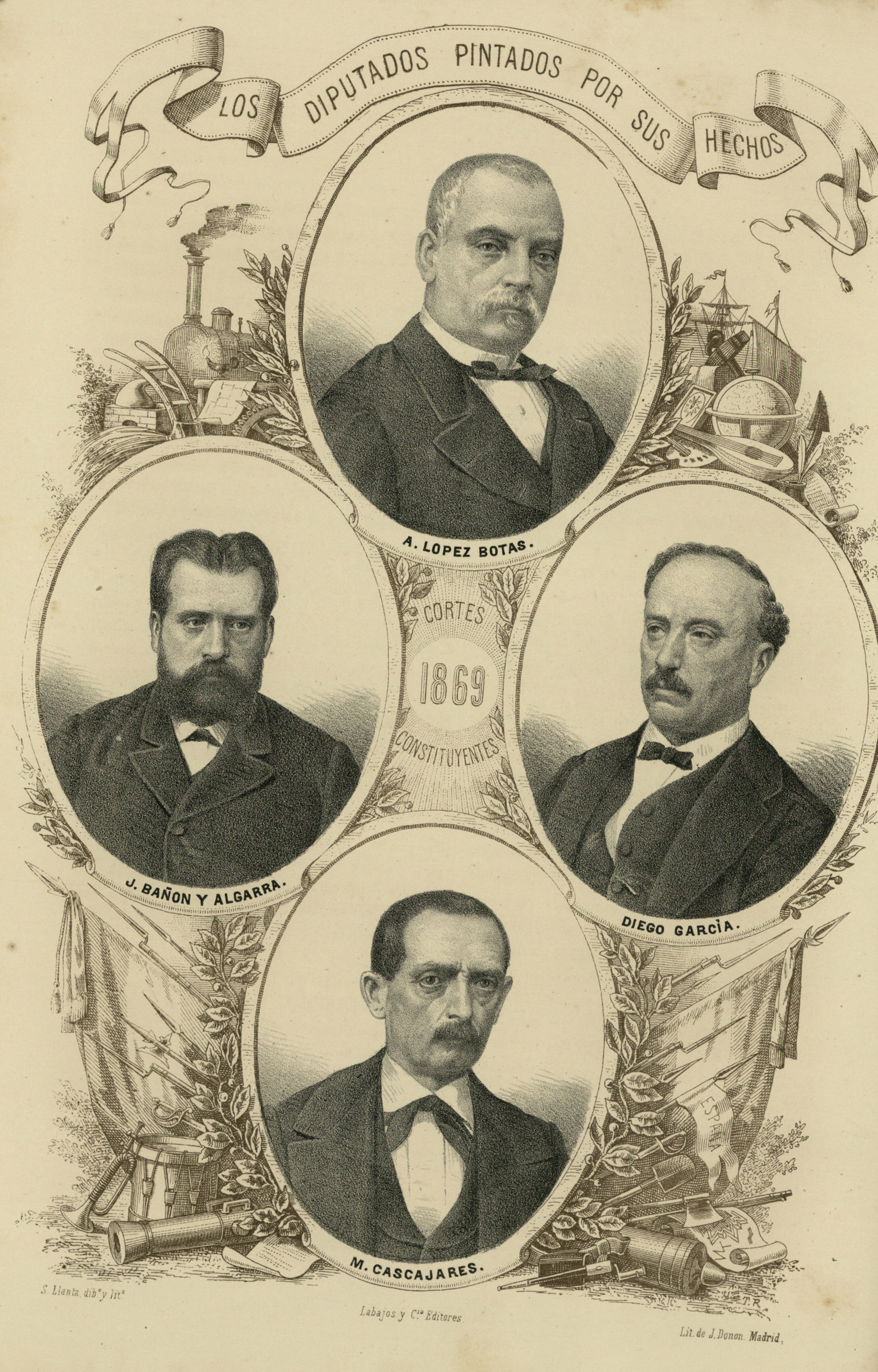 Antonio López Botas; Joaquín Bañón; Diego García; Manuel Cascajares. Litografía de Santiago Llanta para "Los diputados pintados por sus hechos. Colección de estudios biográficos sobre los elegidos por el sufragio universal en las constituyentes de 1869 recopilados por distintos literatos", t. II, Madrid, R. Labajos y Compañía editores, 1869.